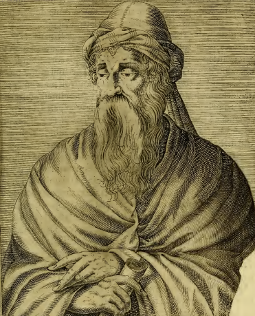 André Thevet (1516-1590), Les vrais pourtraits et vies des hommes illustres grecz, latins et payens, t, I, Paris: Par la vefue I. Kevert et Guillaume Chaudière, 1584 ( p. 20所載の図版.